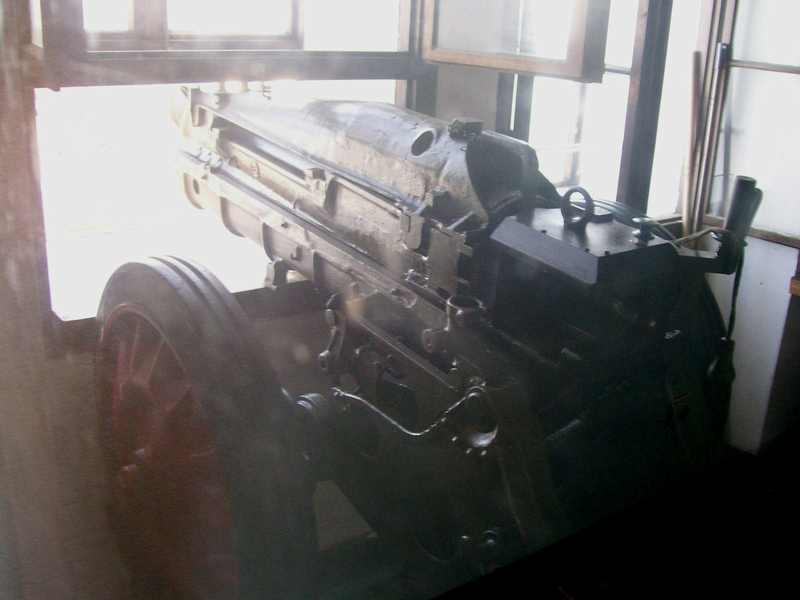 Grički top